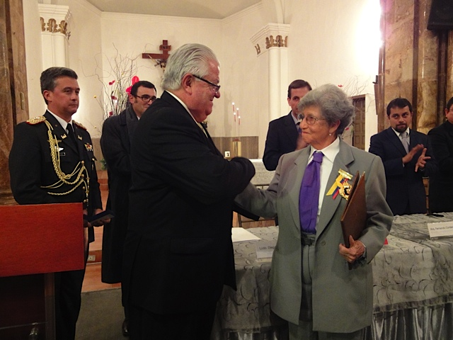 Inauguración de la XI Bienal Internacional de Cuenca en la que el Presidente Fernando Cordero impuso la condecoración Matilde Hidalgo de Prócel a Eudocia Estrella, fundadora de la Bienal Internacional de Cuenca